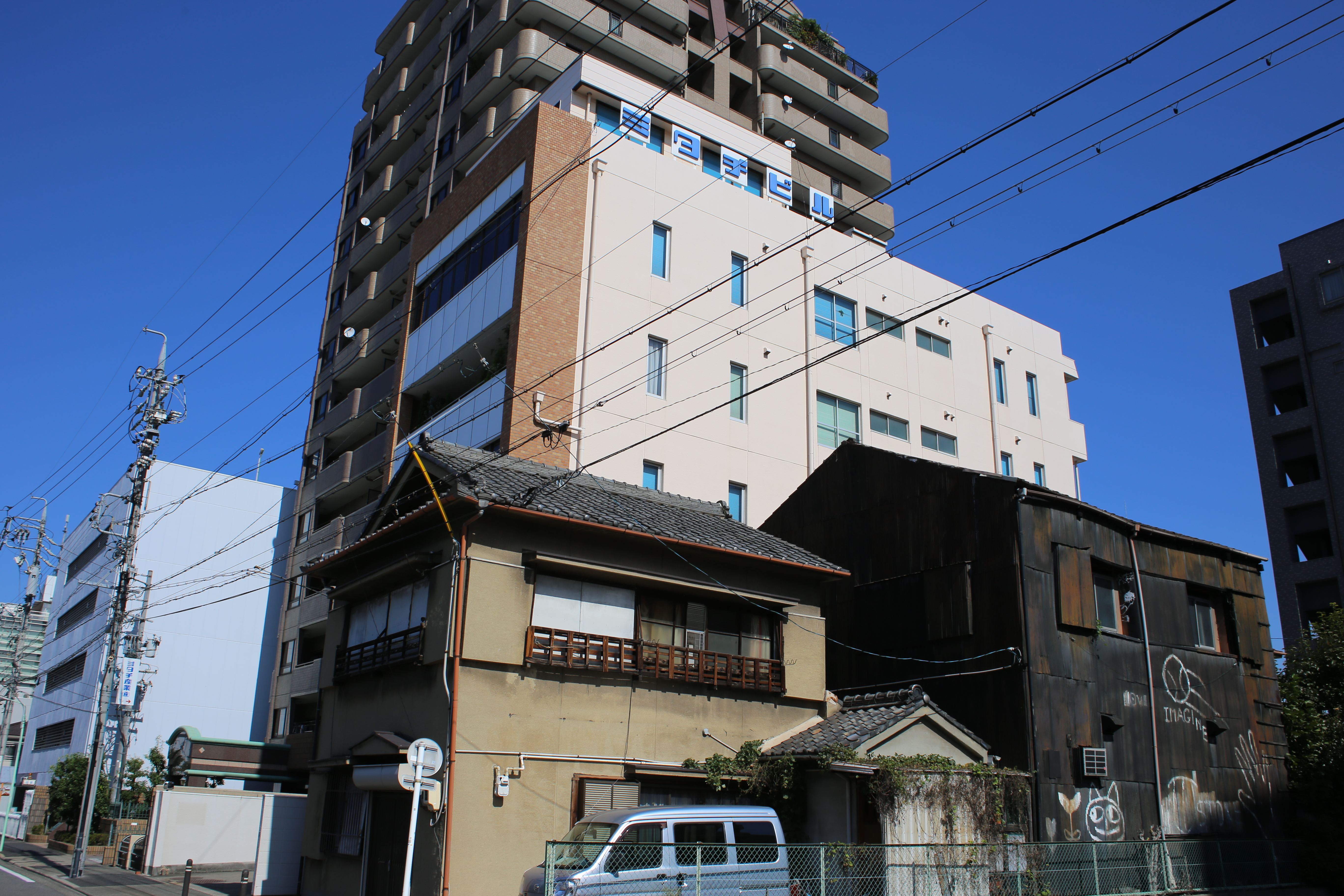 名古屋市中区伊勢山二丁目のミタチ産業 本社を西側公道南側より撮影